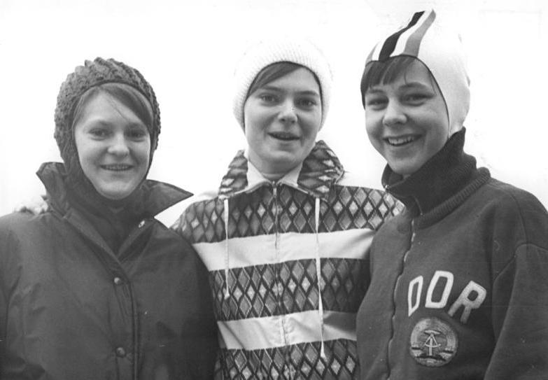 Sabine Klingbeil, Herlind Hürdler, Ruth Schleiermacher Zentralbild Wendorf Sche-Qu 12.2.1967 Berlin: Deutsche Jugendmeisterschaften im Eisschnellaufen Den Titel einer Deutschen Meisterin im Mehrkampf der weiblichen Jugend A sicherte sich am 12.2.1967 im Berliner Dynamo Forum Ruth Schleiermacher (rechts, SC Dynamo Berlin) vor den beiden TSC Läuferinnen Sabine Klingbeil (links) und Herlind Hürdler. Abgebildete Personen: Hürdler, Herlind: Eisschnelläuferin, DDR Schleiermacher, Ruth: Eisschnelläuferin, Olympiateilnehmerin 1968 und 1972, DDR